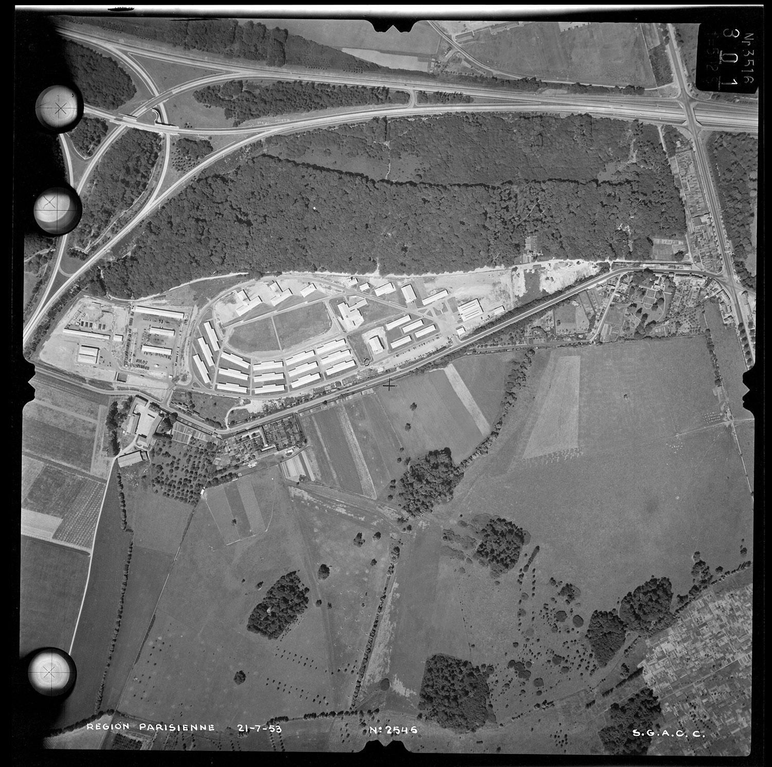 Site du camp militaire US de Voluceau le 09-08-1953. Aujourd'hui la partie ouest du site (à gauche) est le centre d'entretien du matériel de la Brigade de Sapeurs Pompiers de Paris